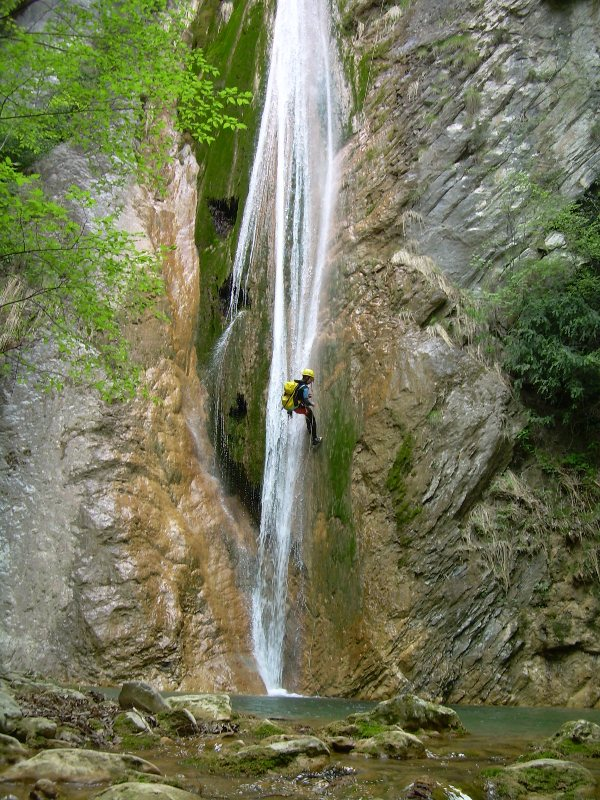 Ultimi metri della calata da 35 metri